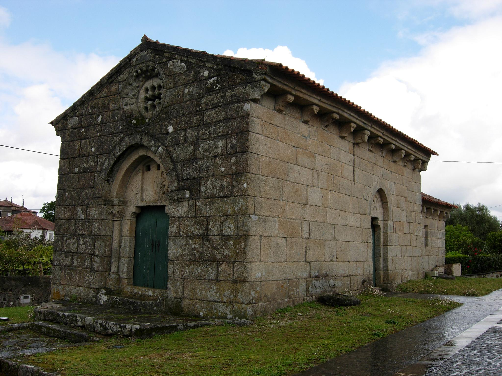 Iglesia románica, probablemente del siglo XII, que conserva integra su primitiva fábrica. Correlhã, Ponte de Lima, Viana do Castelo, Portugal Al lado encontramos la iglesia de São Tomé da Correlhã o Igreja Matriz, también del mismo estilo arquitectónico, pero de construcción posterior, mediados del siglo XIII. Se piensa que una vez concluida, se utilizo la iglesia de Santo Abdão como capilla funeraria. Vuela hasta esta localización. Necesitas el programa Google Earth. Esta foto participó en el juego En un lugar de Flickr.